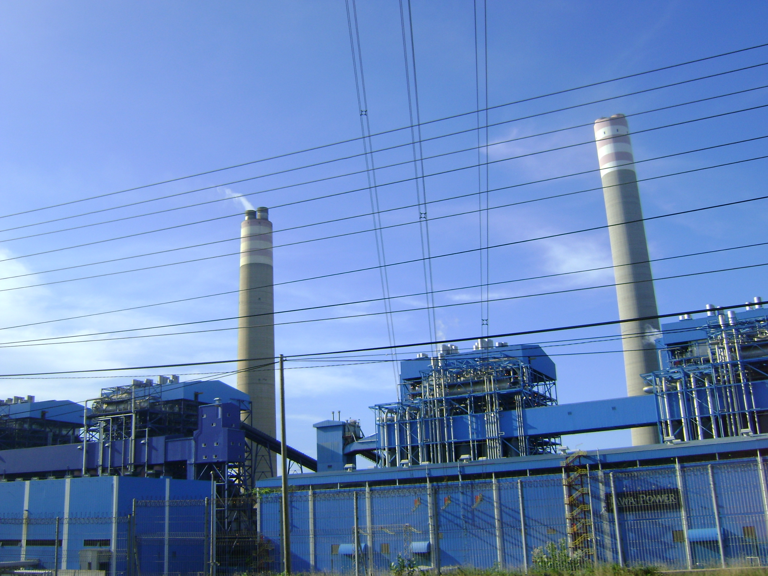 PLTU Paiton dari jalan